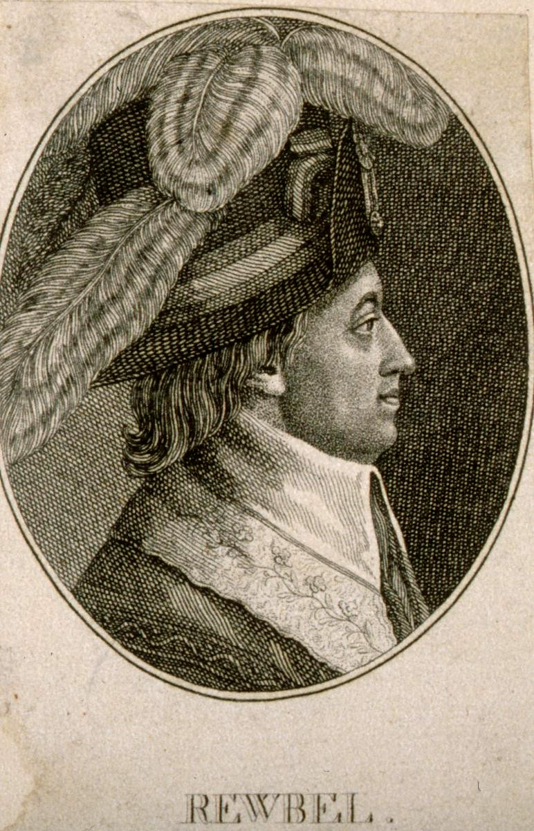 Jean-François Reubell (estampe)